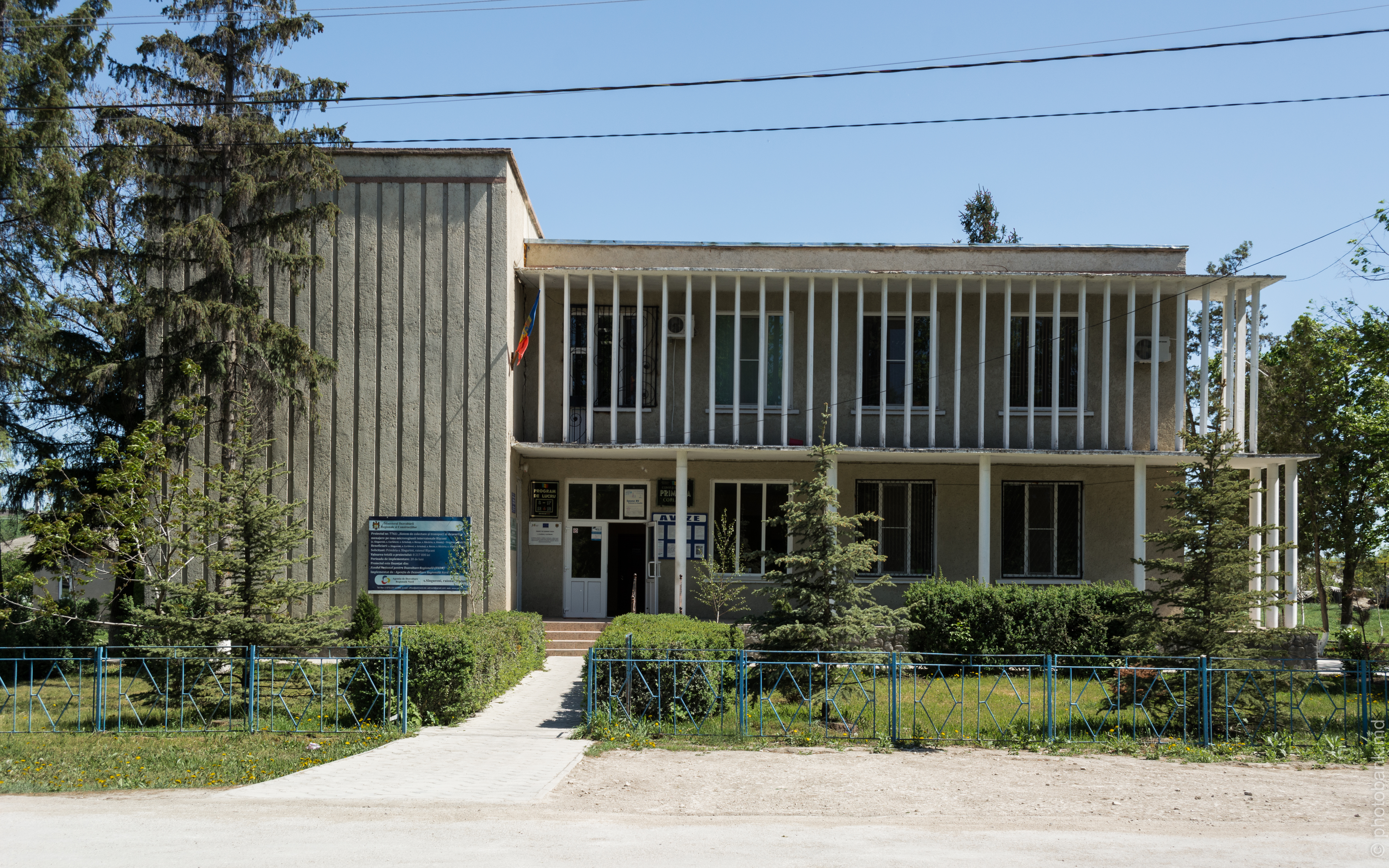 Администрация Корлатен (Рышканский район) / Primaria satului Corlateni (r-n Riscani)